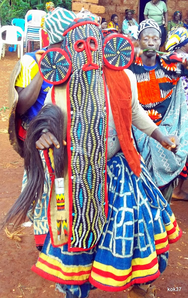 Zing, une danse exécutée lors de funérailles à Bamougong.